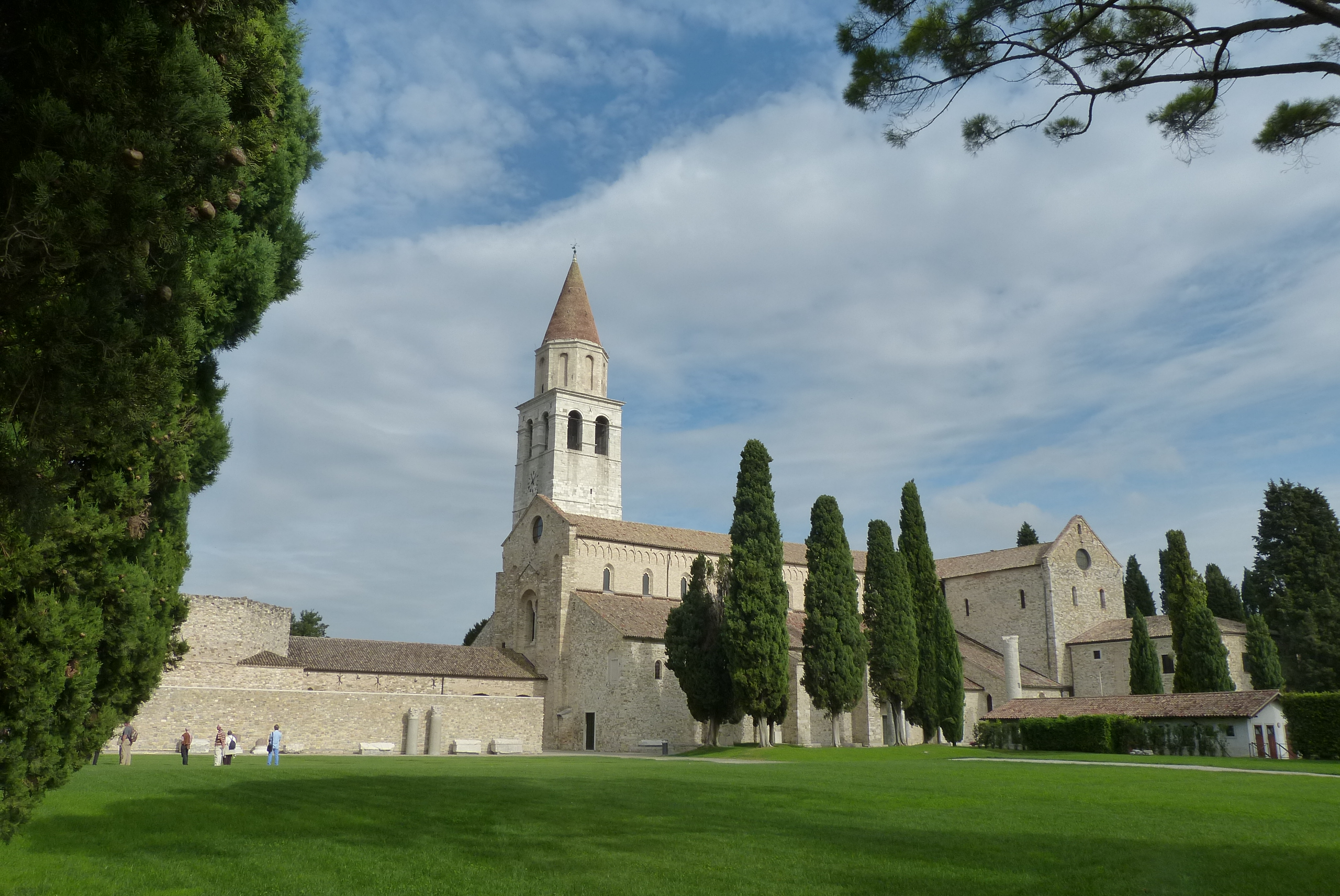 Basilika von Aquileja von Südwesten This is a photo of a monument which is part of cultural heritage of Italy.